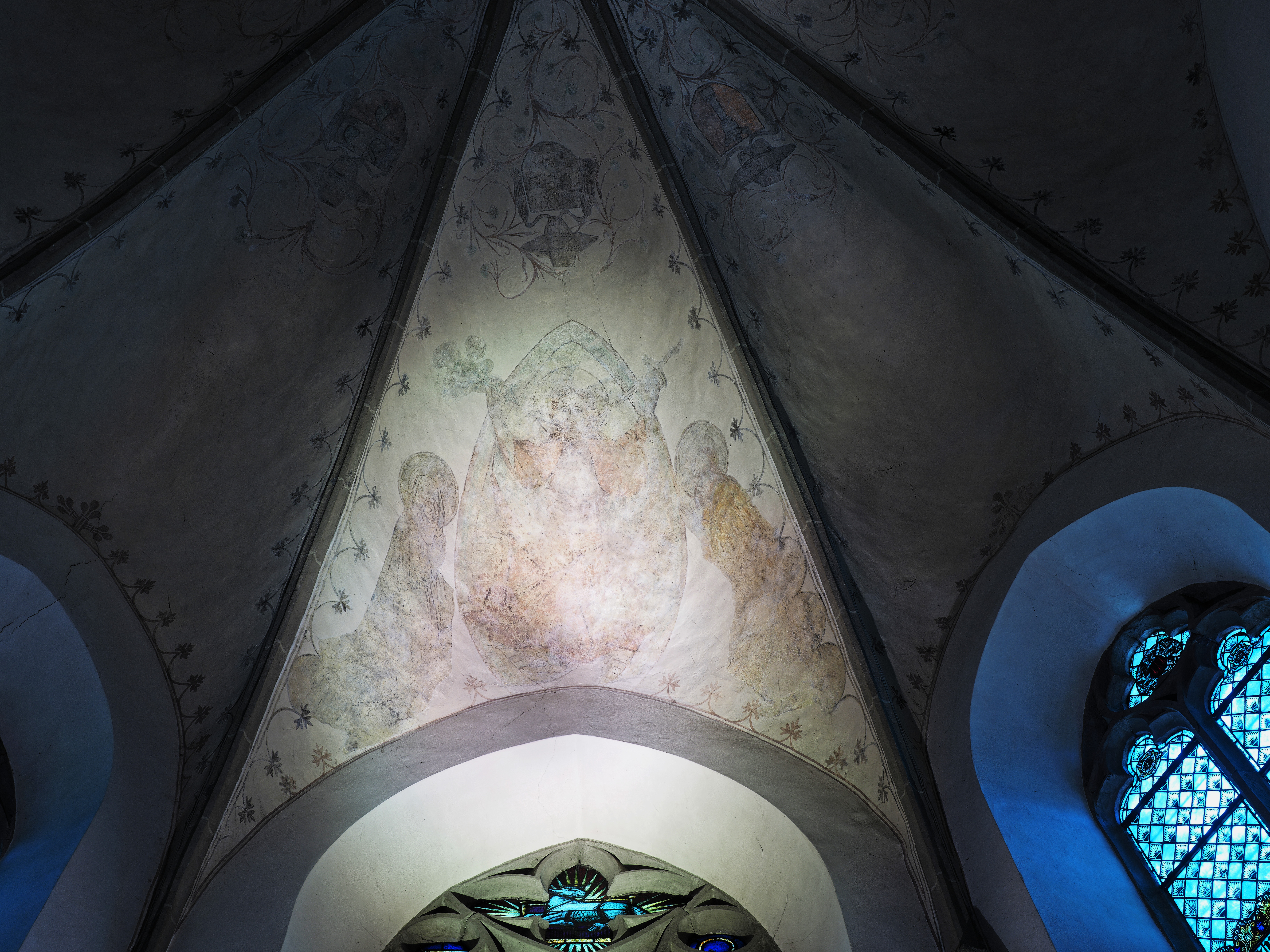 Segnender Jesus abgebildet im Fresko in der Chorkuppel der Christuskirche, Kirchplatz 9, Plettenberg. Dieses Foto wurde stark kontrastverstärkt um die verblassten Farben deutlicher zu machen; weitere Manipulationen am Foto fanden nicht statt.